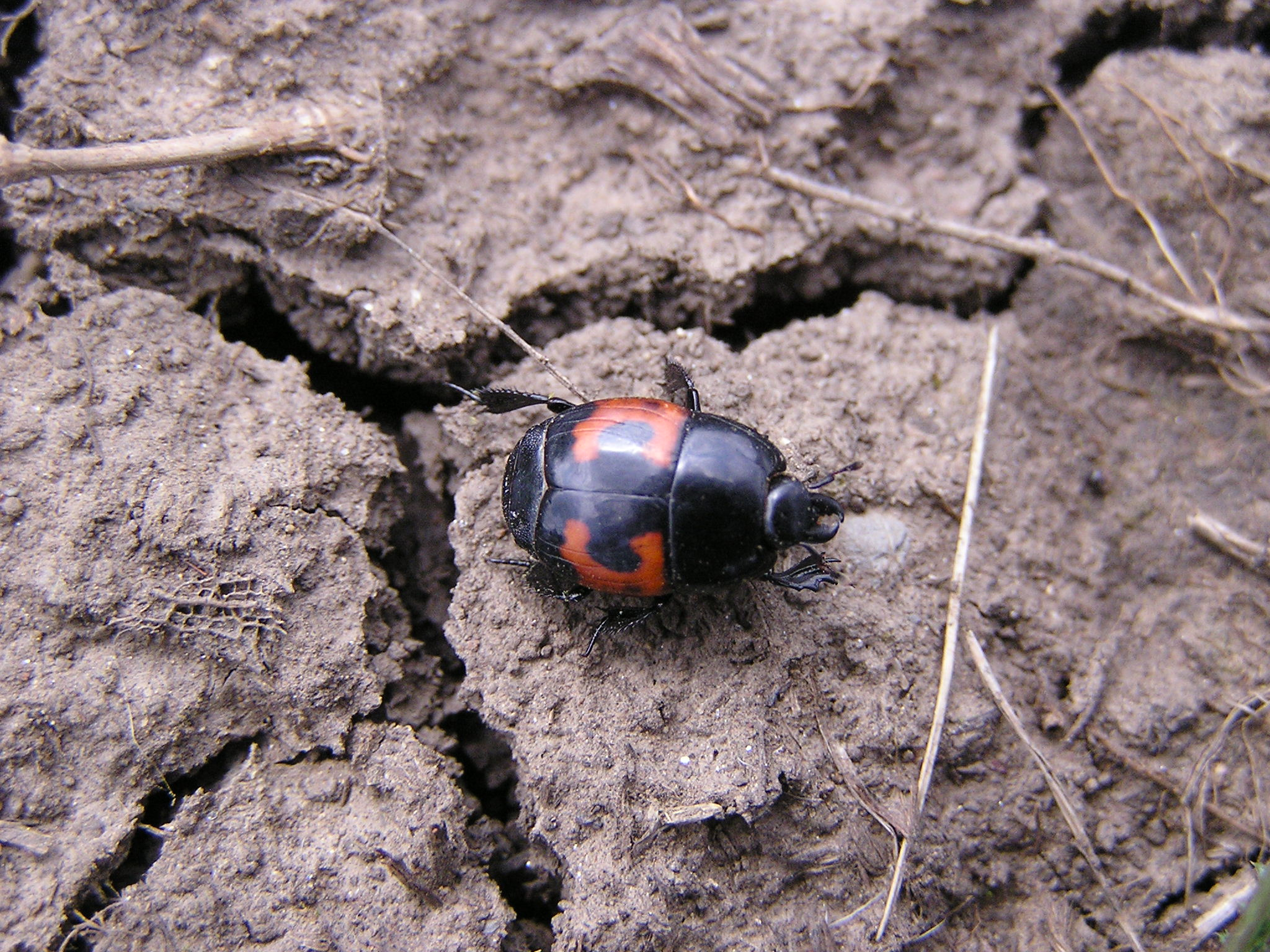 Жук-карапузик, род и вид -- под вопросом (Coleoptera: Histeridae. Снято в Донецке в апреле. Hister illigeri